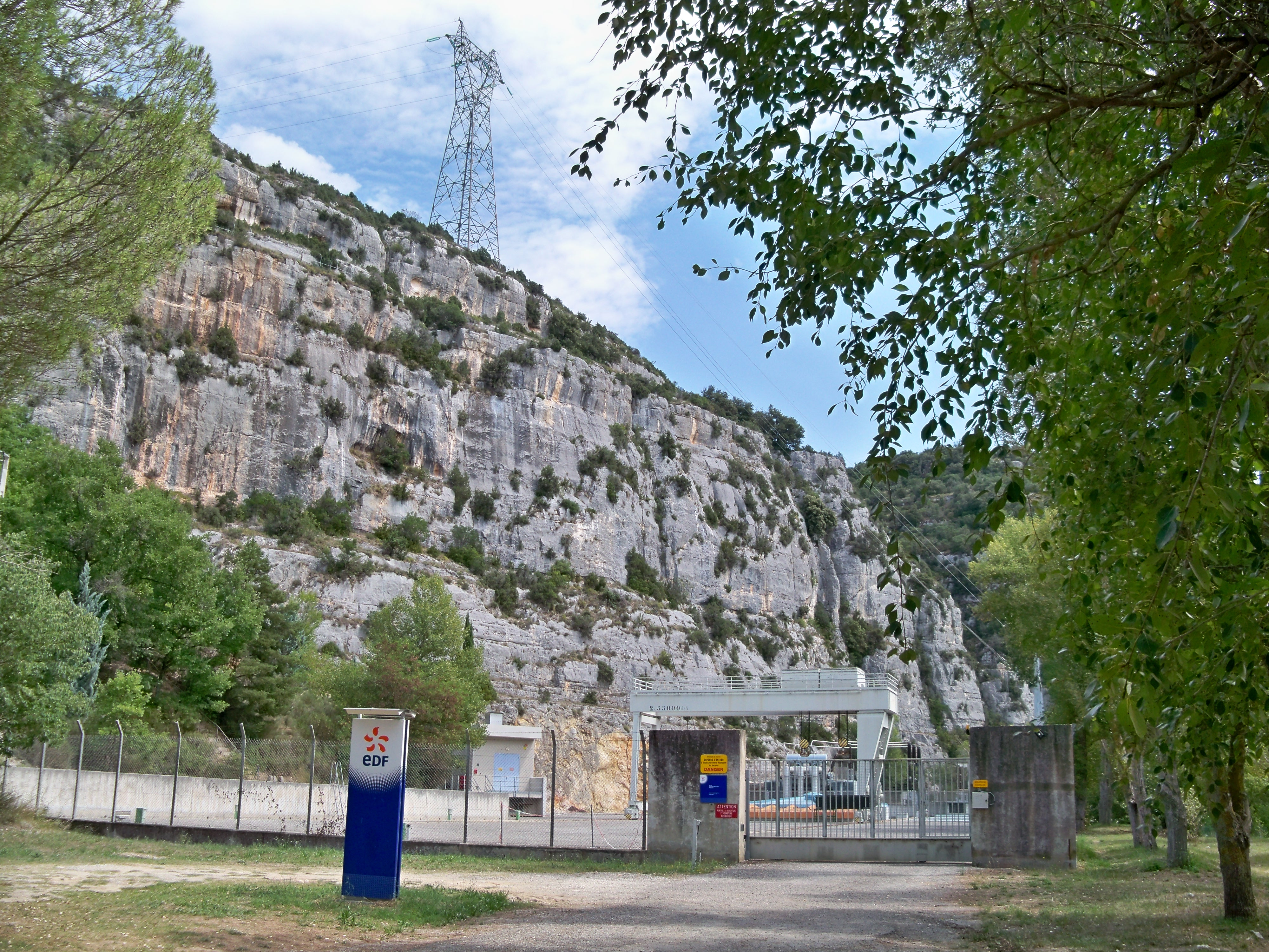 Centre hydroélectique de Quinson (04)